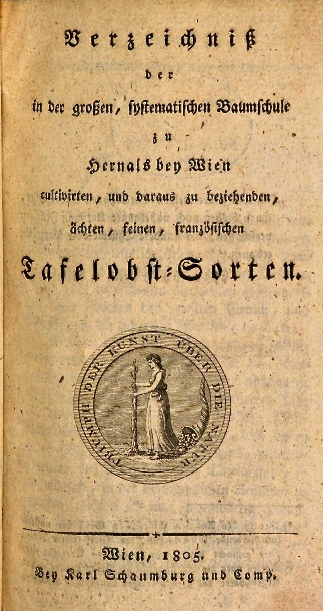 (Franz Joseph Märter:) Verzeichniß der in der großen, systematischen Baumschule zu Hernals bey Wien cultivirten, und daraus zu beziehenden, ächten, feinen, französischen Tafelobst-Sorten, Karl Schaumburg und Comp., Wien 1805.